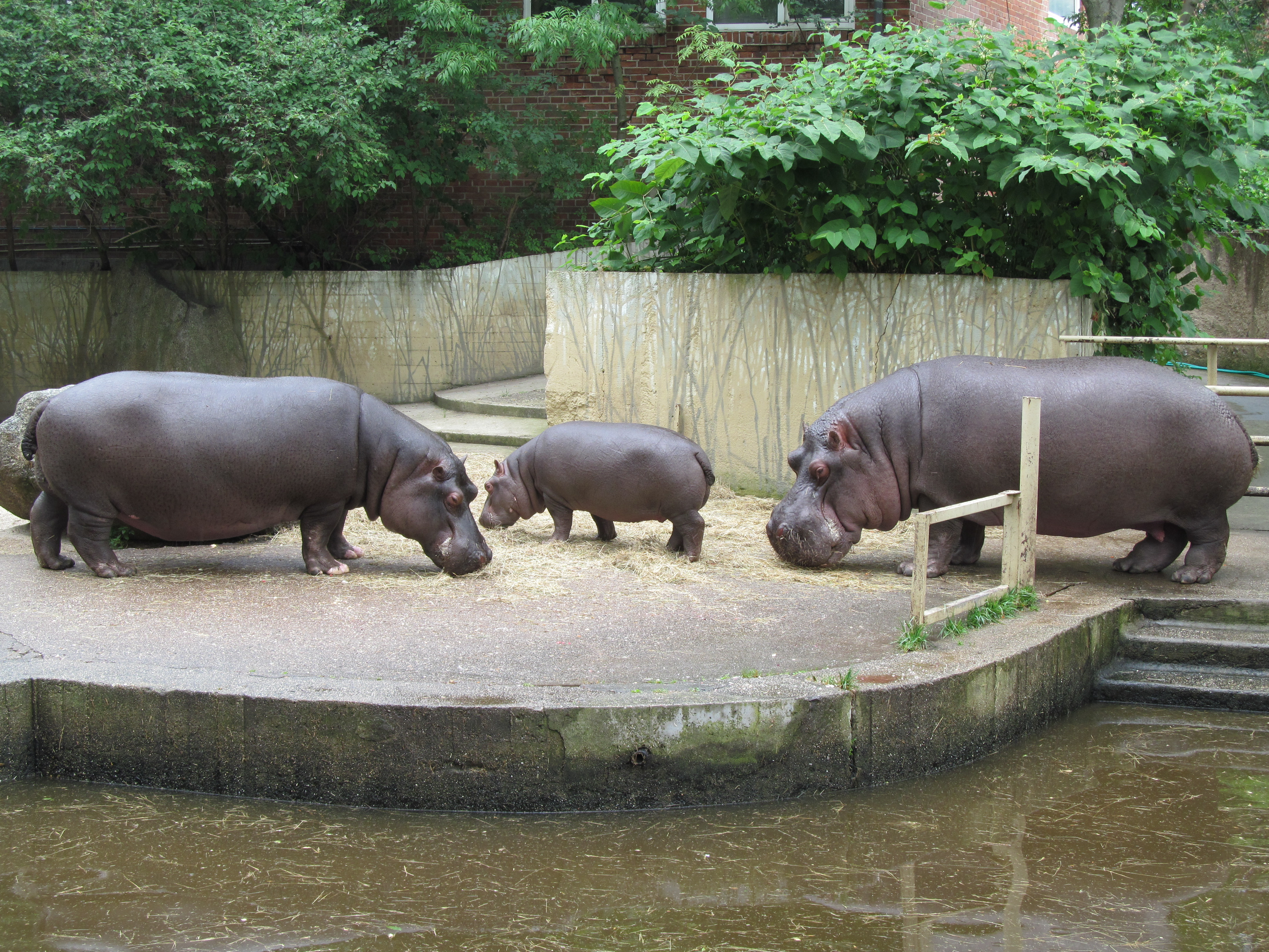 משפחת היפופוטמים בגן החיות של פראג